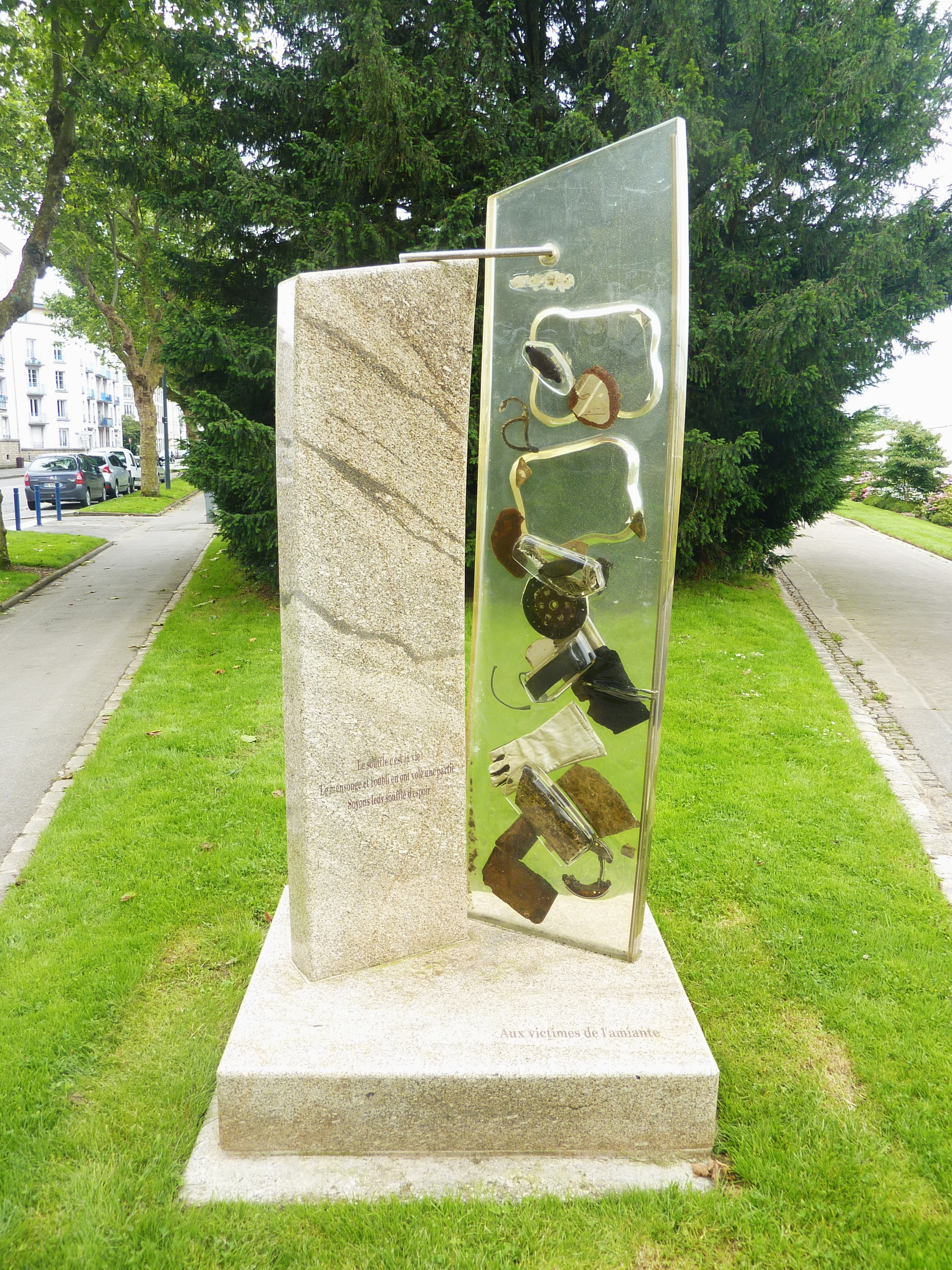 Brest : le monument Aux victimes de l'amiante", boulevard Jean Moulin, près de l'arsenal